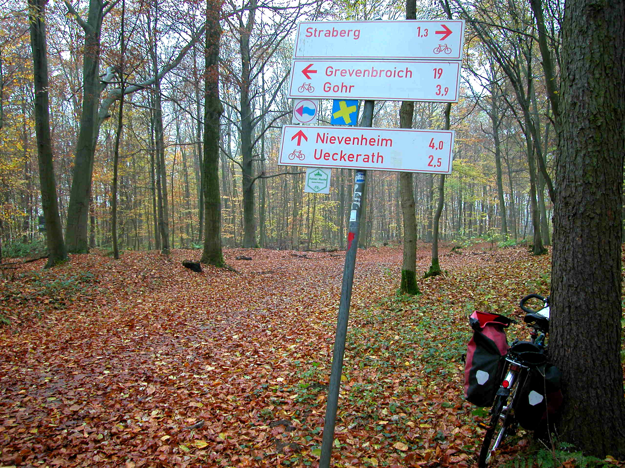 NiederRhein Fahrradroute, NRW, Deutschland